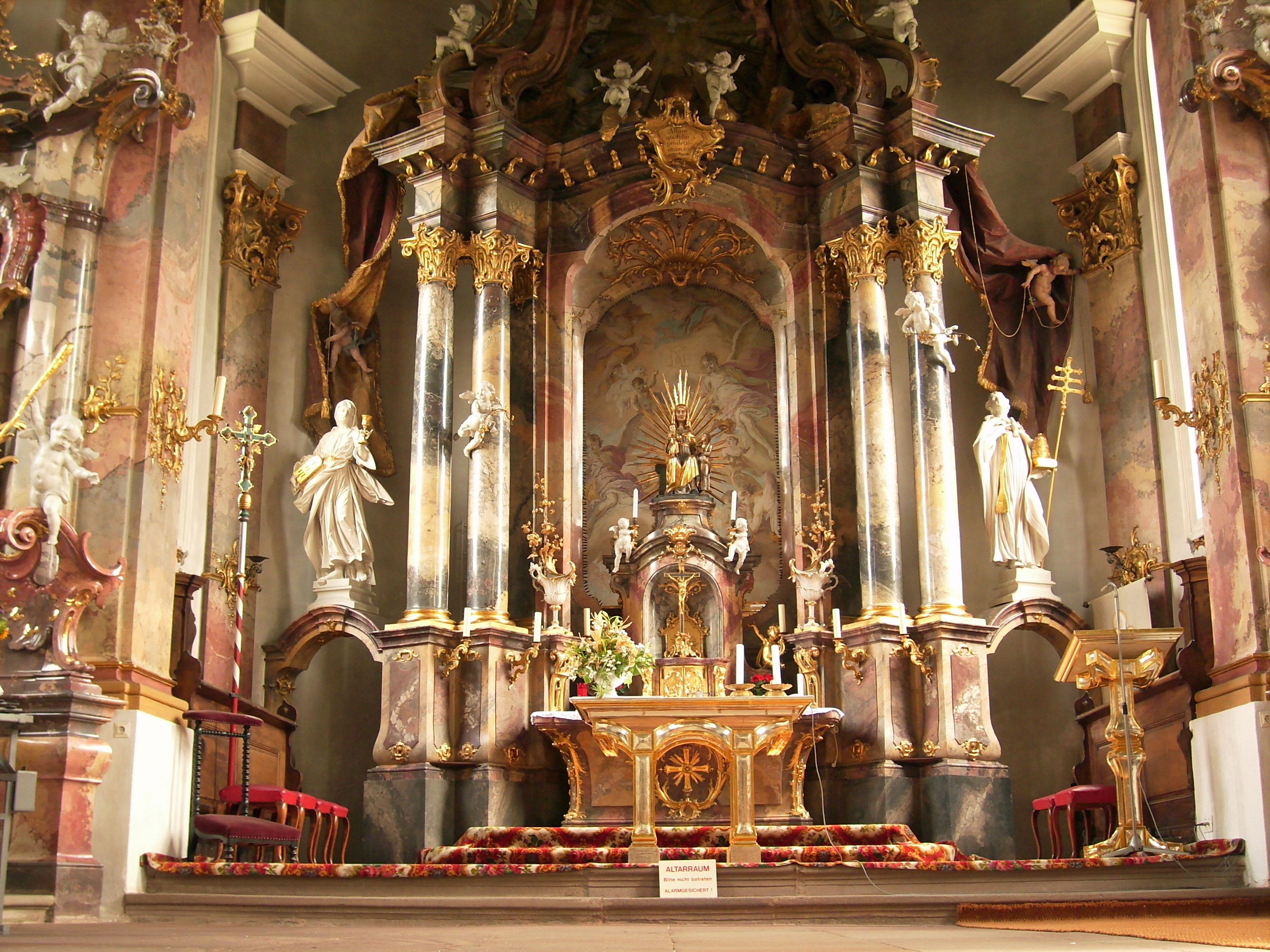 Haigerloch Wallfahrtskirche Sankt Anna